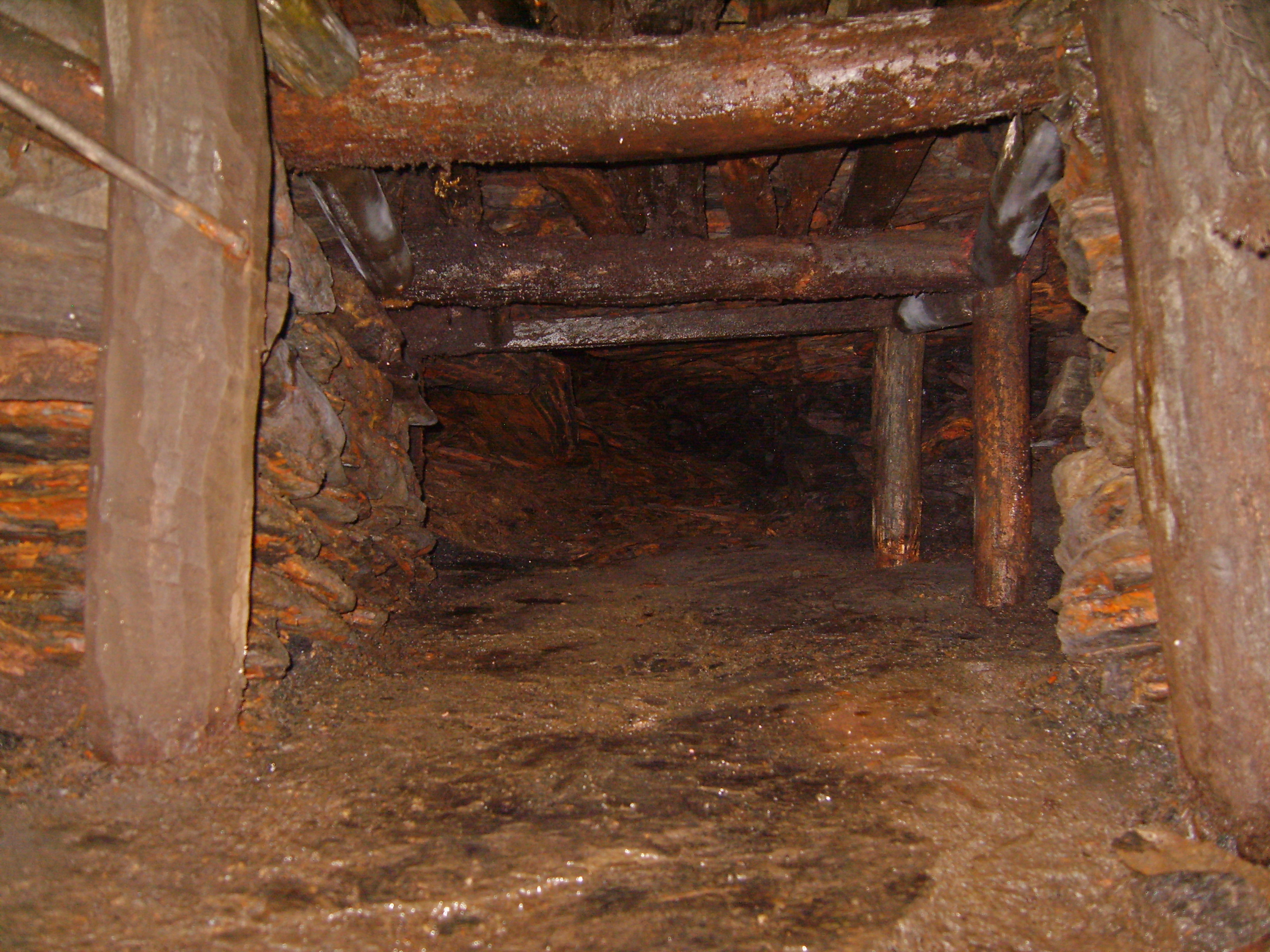 Im Besucherbergwerk Graf Wittekind